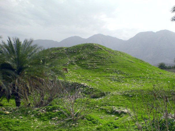 تل باستانی علامرودشت